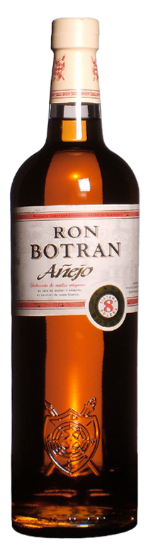 Botella de Ron Botrán Añejo. Hecho en Guatemala con mieles vírgenes de caña de aúcar y añejado en barricas de roble blanco.